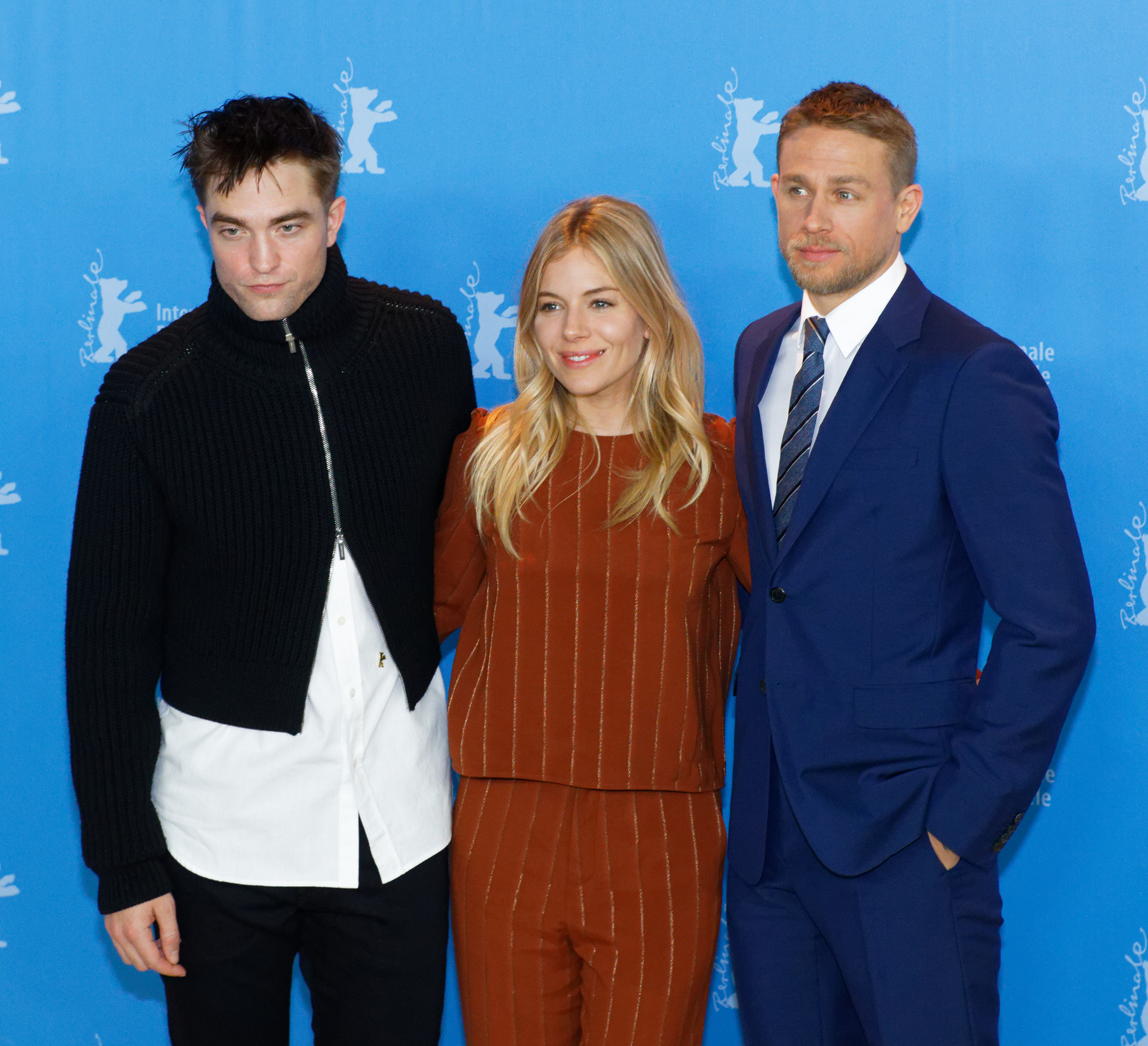 Cast beim Photo Call zu Die versunkene Stadt Z bei der Berlinale 2017: v.l.n.r. Robert Pattinson, Sienna Miller, Charlie Hunnam